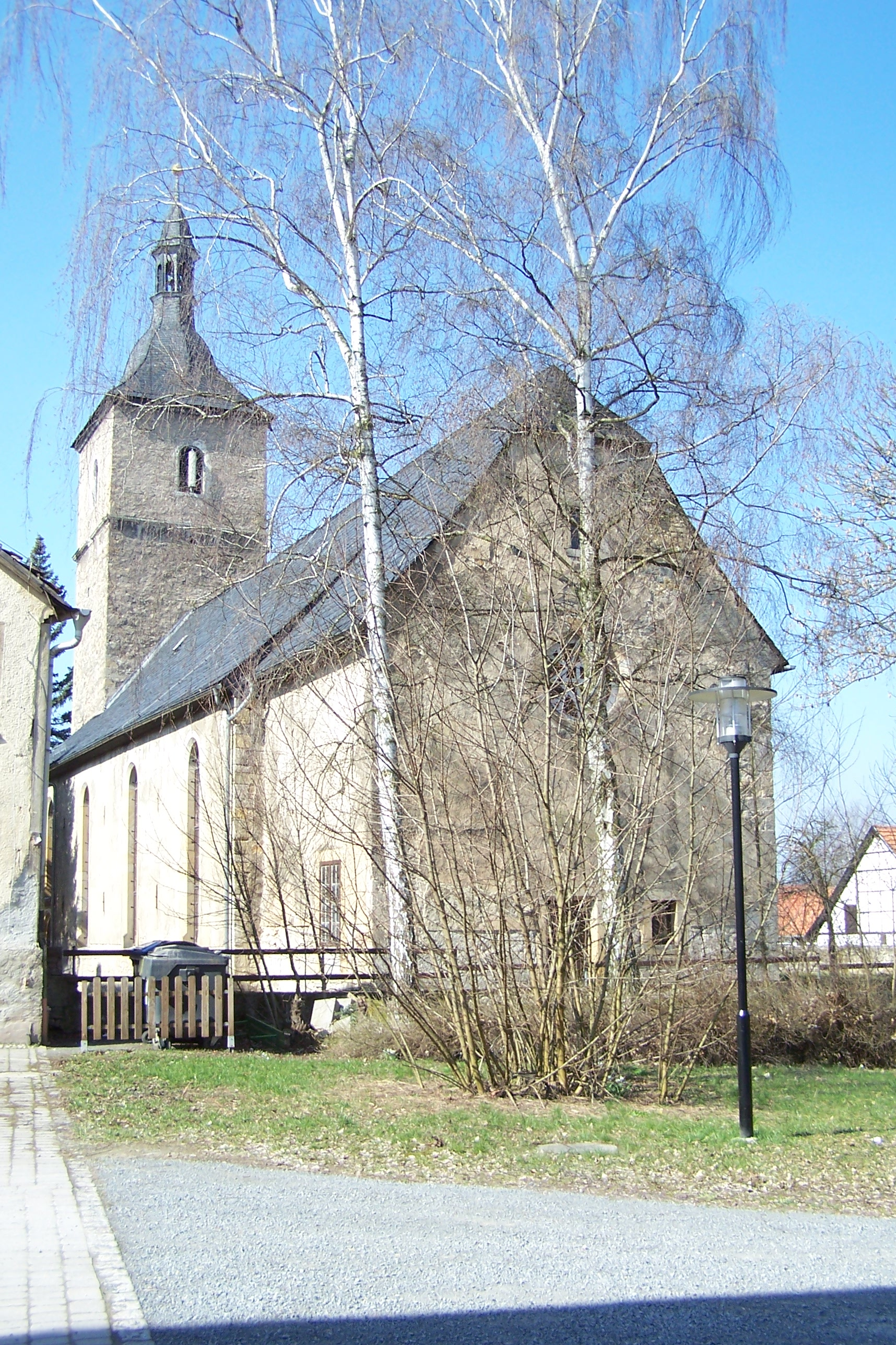 Ansichten und Details zum Ort Behringen im Wartburgkreis.